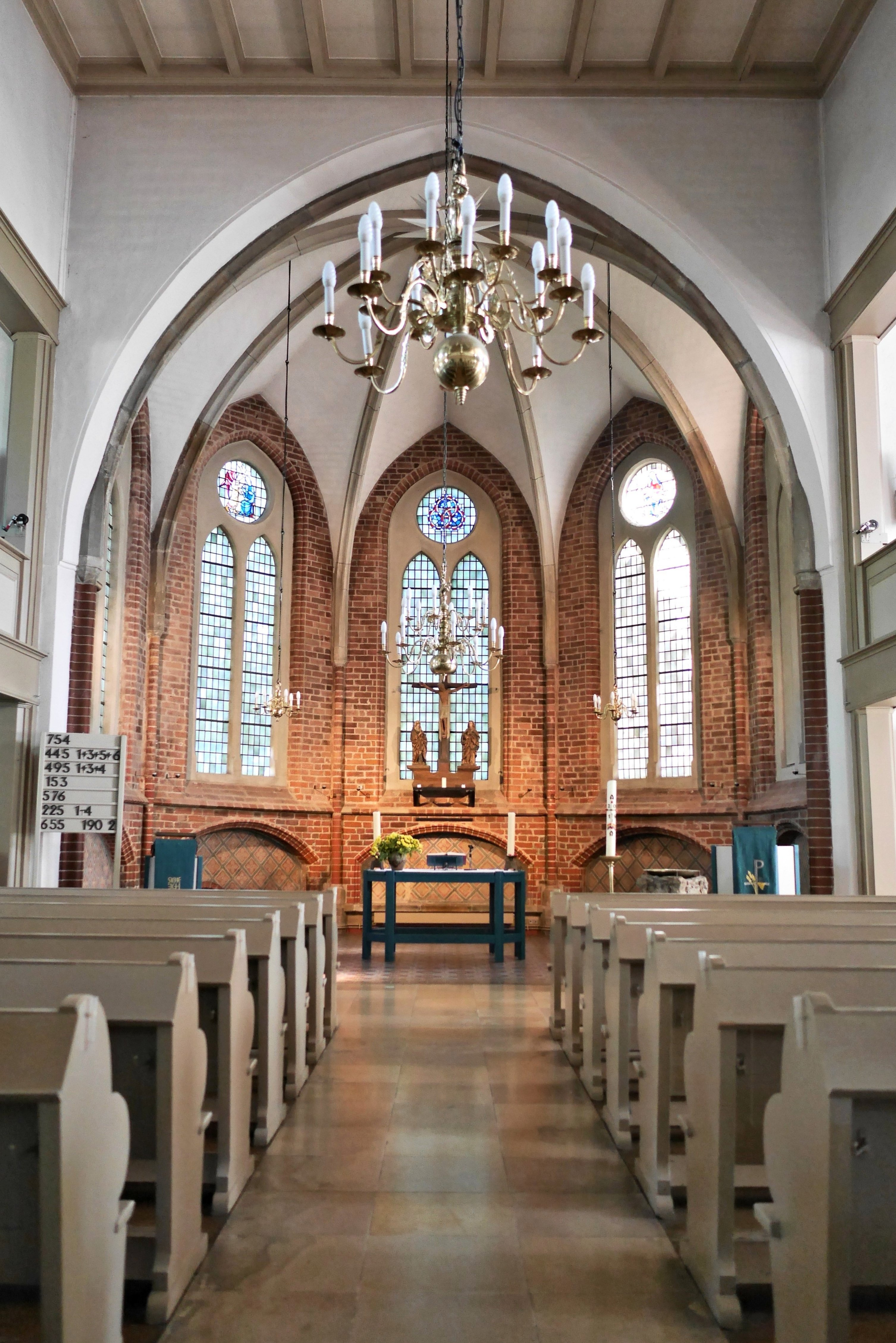 Germany, Hannover, St. Marienkirche Hainholz - Kirchenschiff und gotischer Chorraum